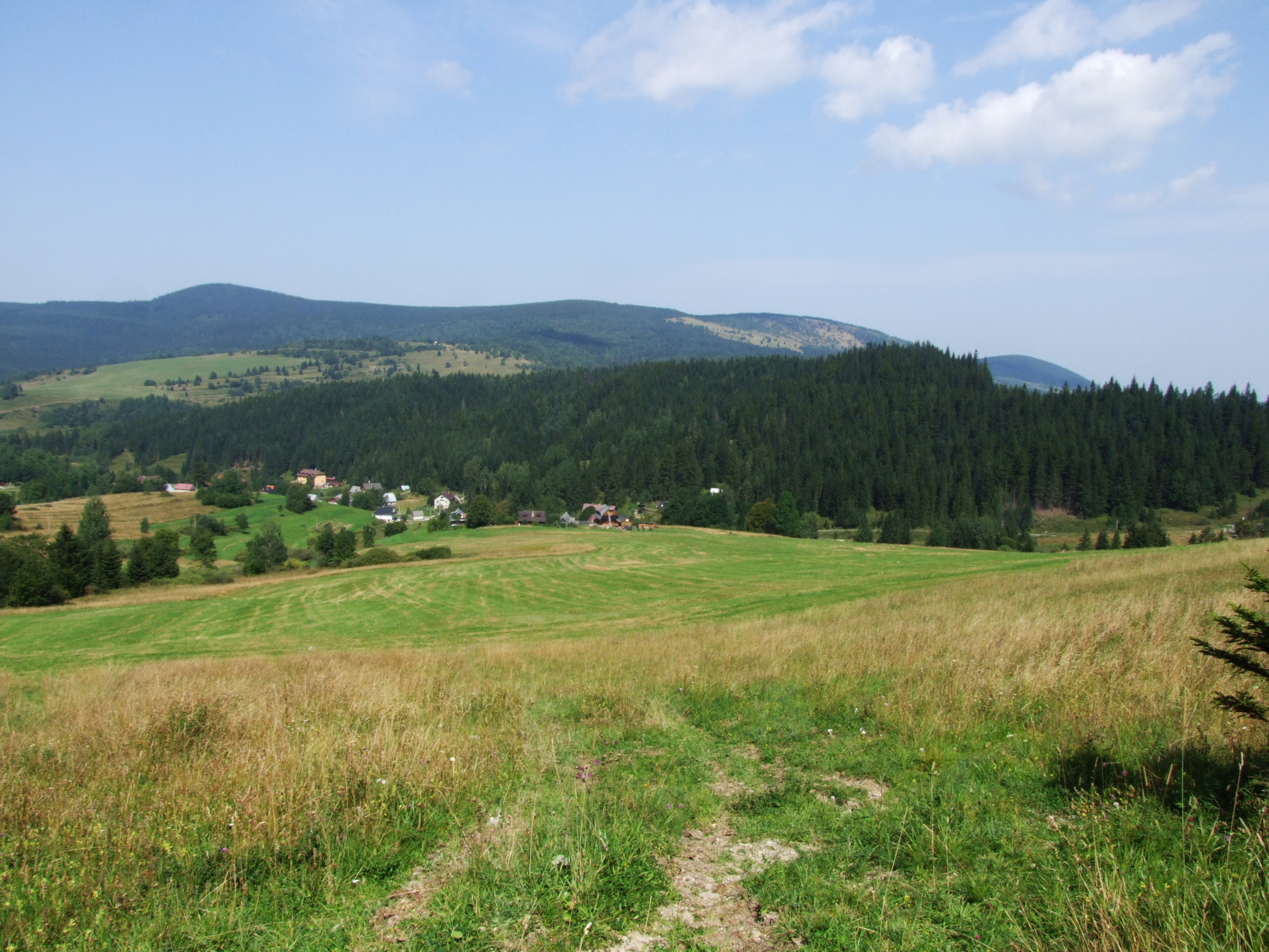 Widok z szosy po południowej stronie Wyżniej Przełęczy Huciańskiej